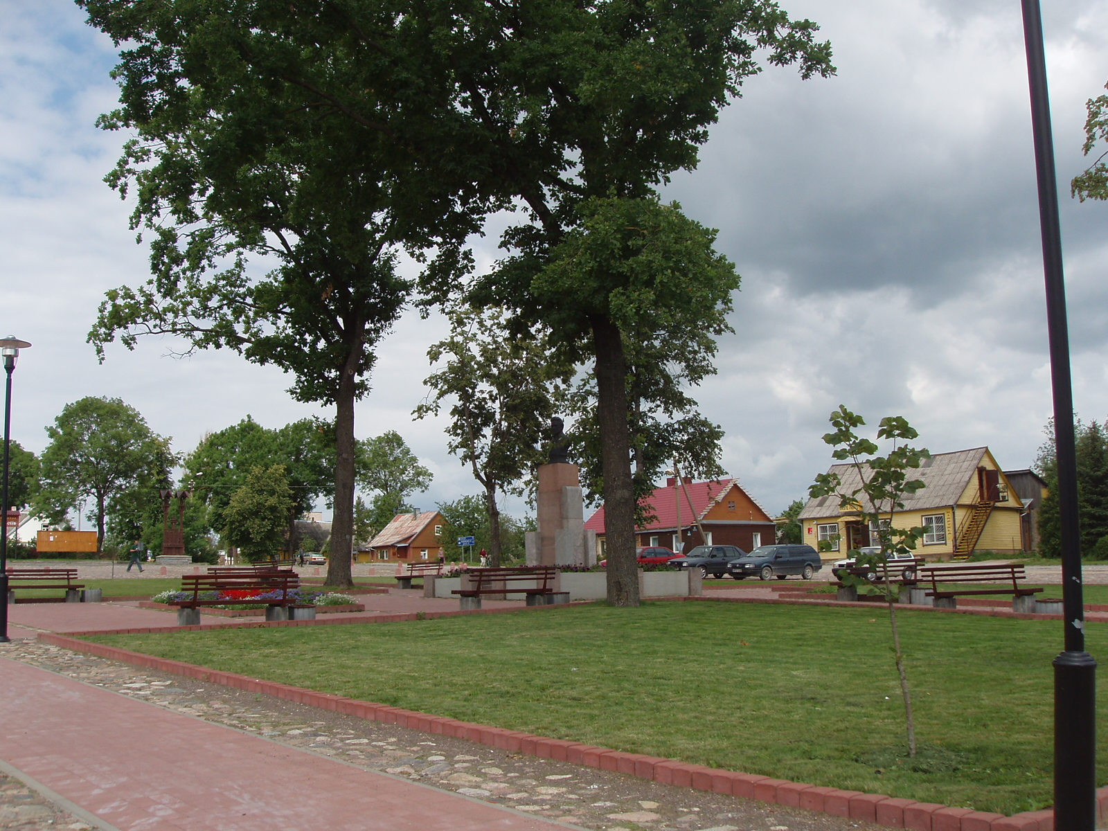 Antanas Strazdas Kamajai square, Aukštaitija, Lithuania